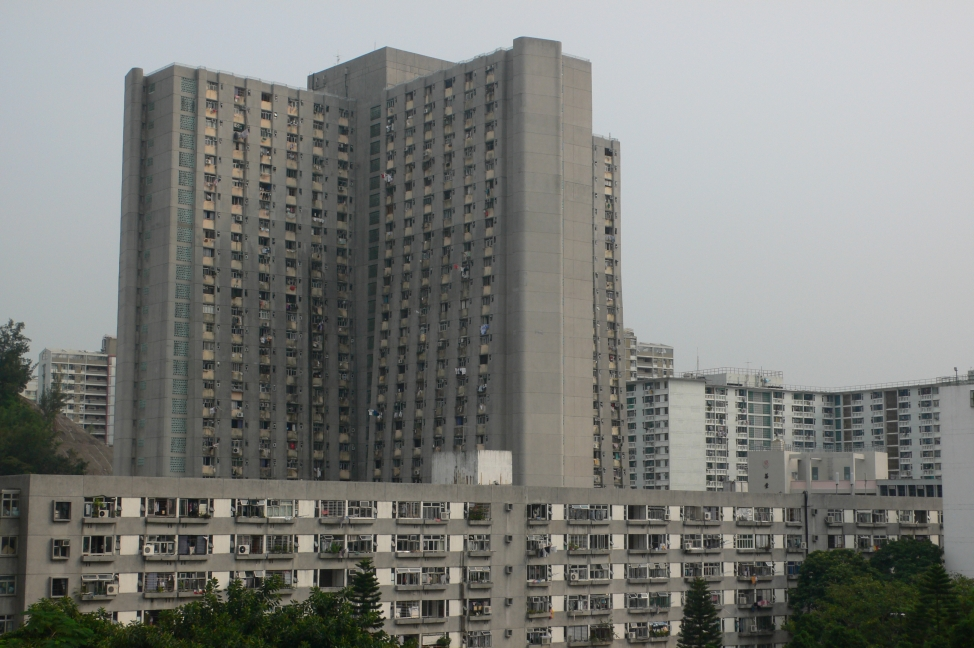 Shun On Estate, Hong Kong